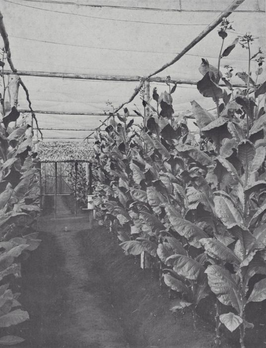 Foto. Een schaduwproef voor de tabaksteelt met Deli tabak, Oost Sumatra.